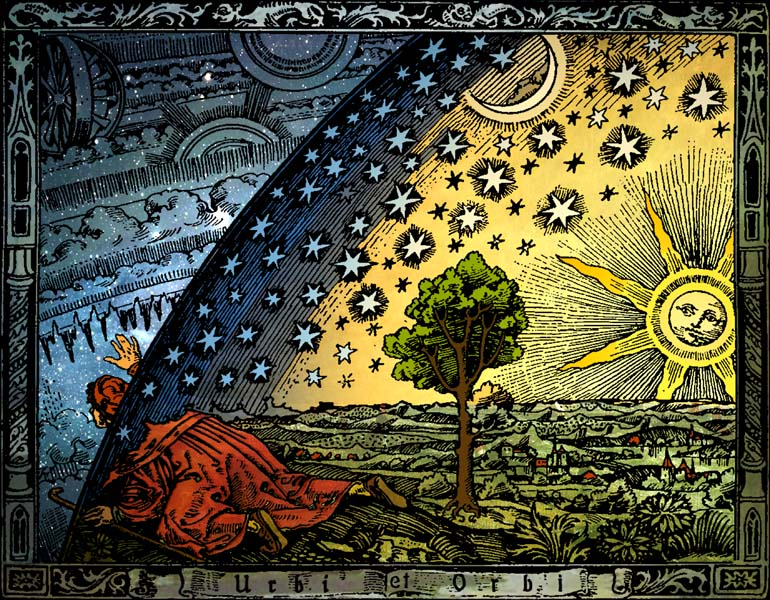 Holzschnitt aus Camille Flammarion: L'Atmosphere - Météorologie Populaire. Paris 1888. Kolorierung : Heikenwaelder Hugo, Wien 1998.